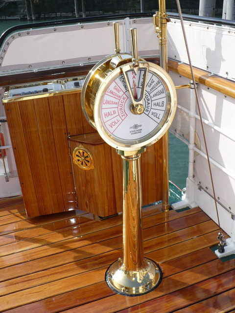 Bodensee-Dampfschiff Hohentwiel Maschinentelegraf